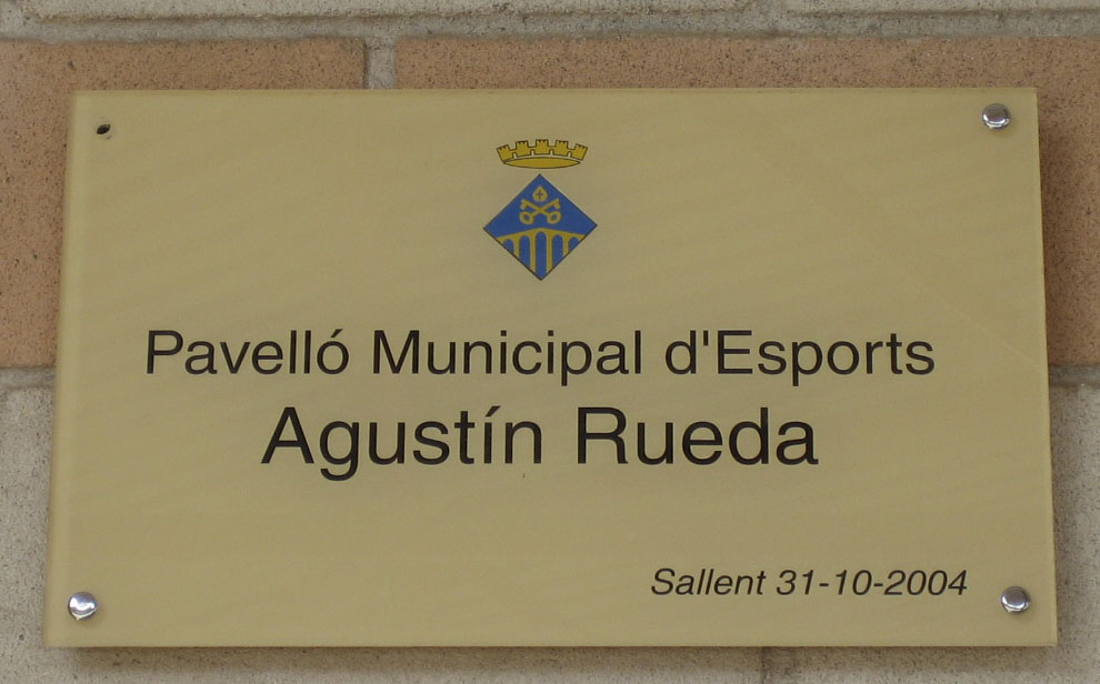 Agustín Rueda (placa)